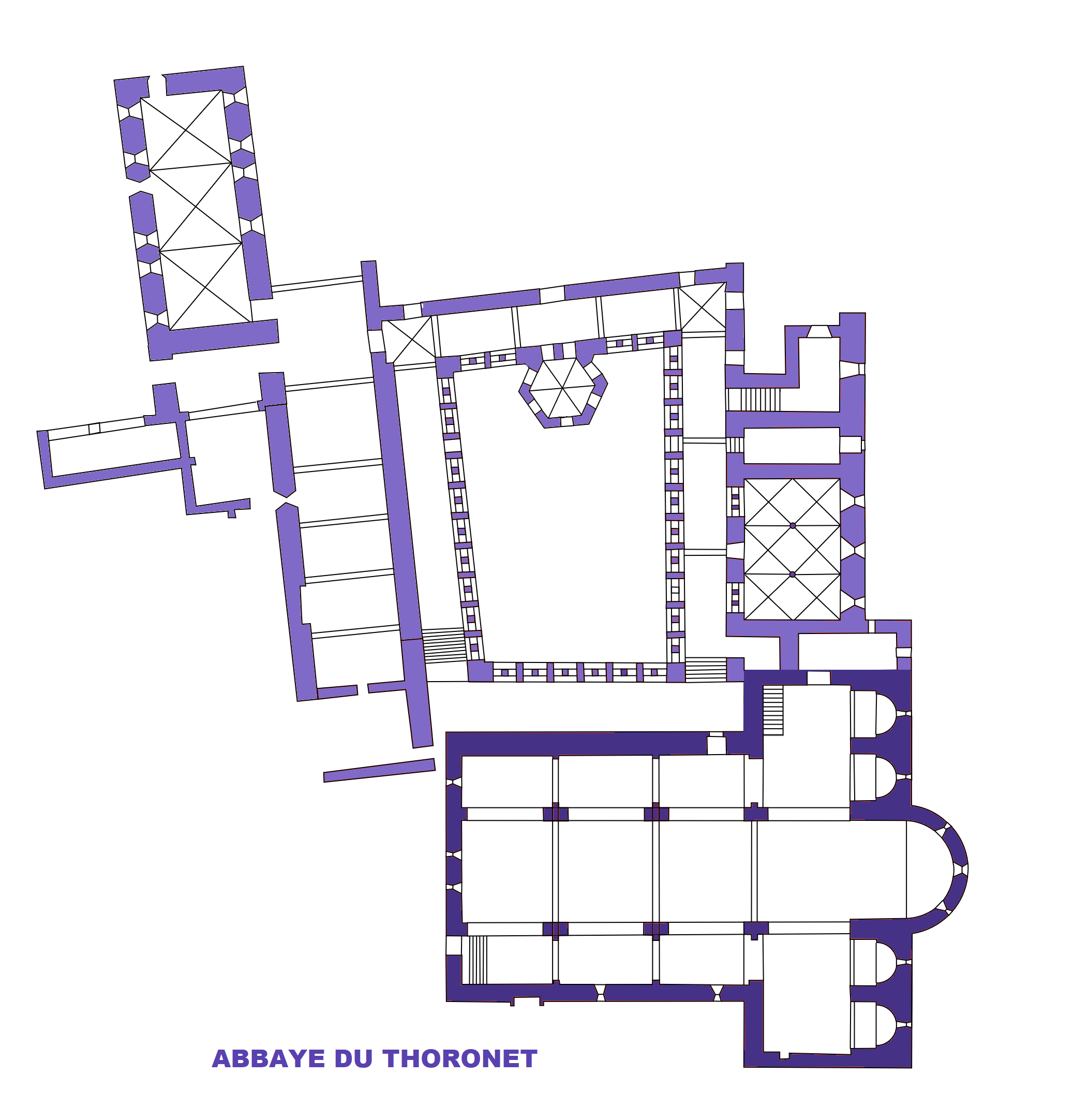 Abbaye du Thoronet, Plan (image Commons modifiée)